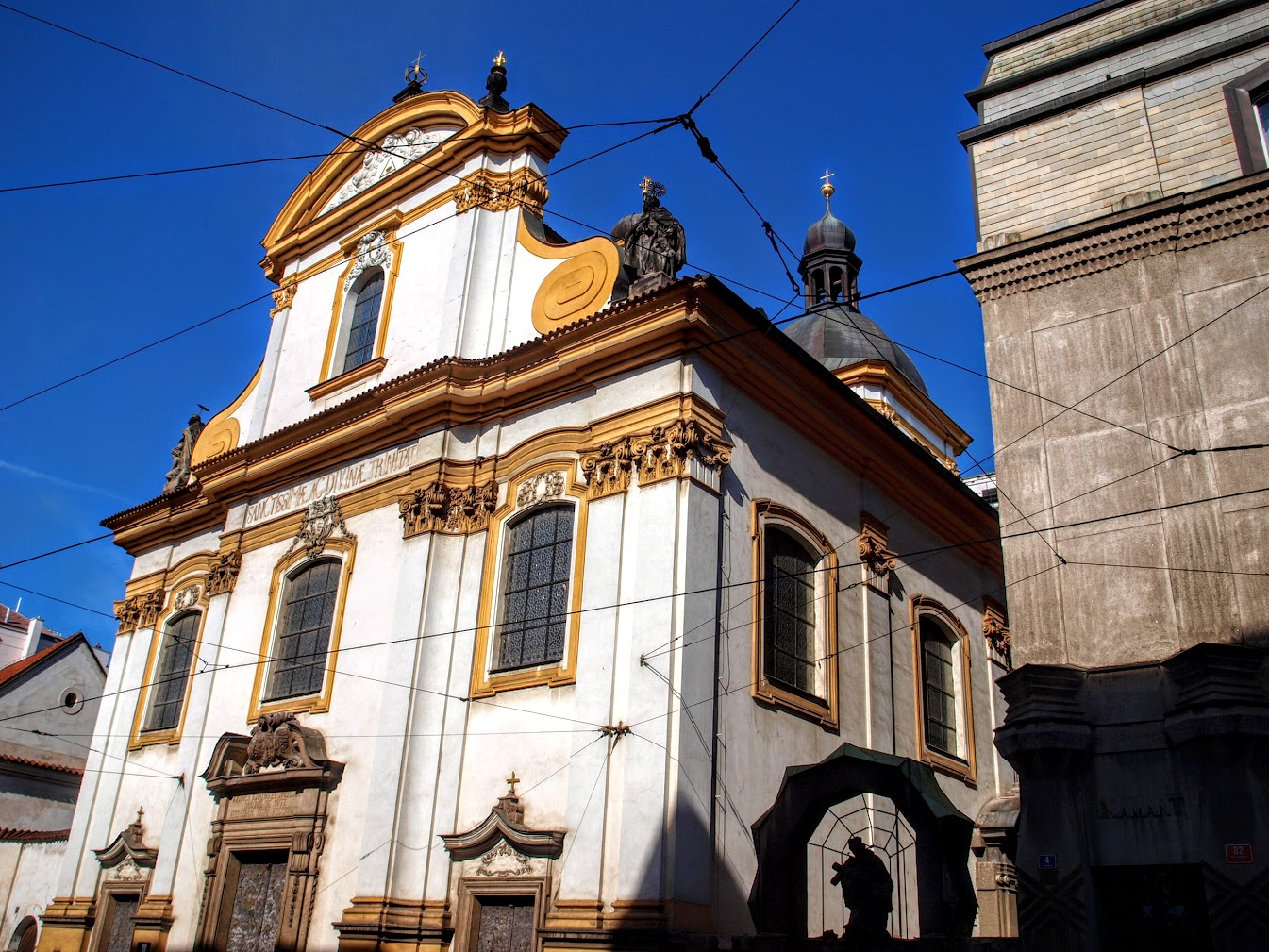 kostel Nejsvětější Trojice ve Spálené ulici